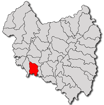 Categorie:Hărţi ale judeţului Covasna